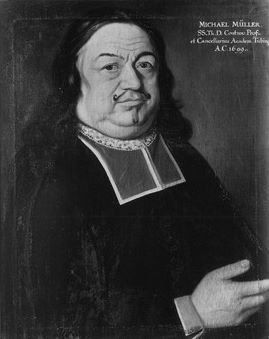 Gemälde in der Professorengalerie Tübingen